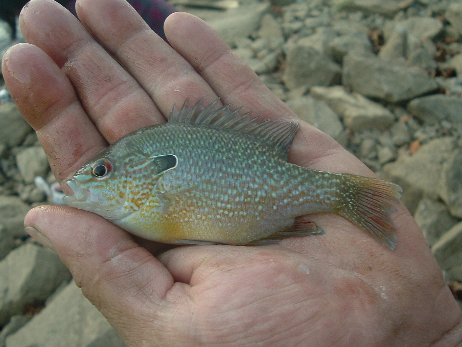 A young L.megalotis.